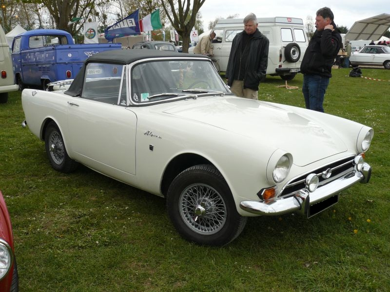 Mantes la Jolie 2012